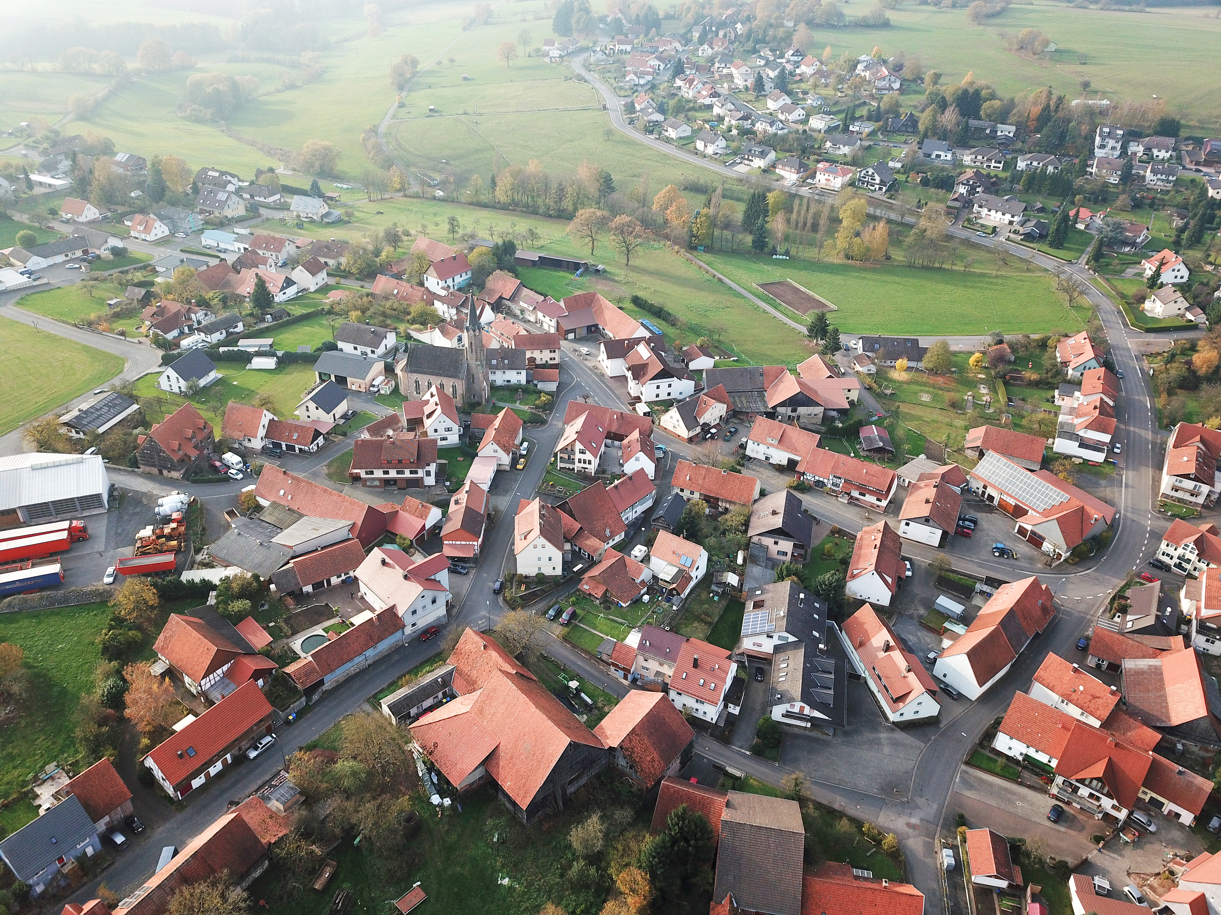 Luftaufnahme von Hohenzell (Hessen). Zu sehen sind der Ortskern mit Kirche.